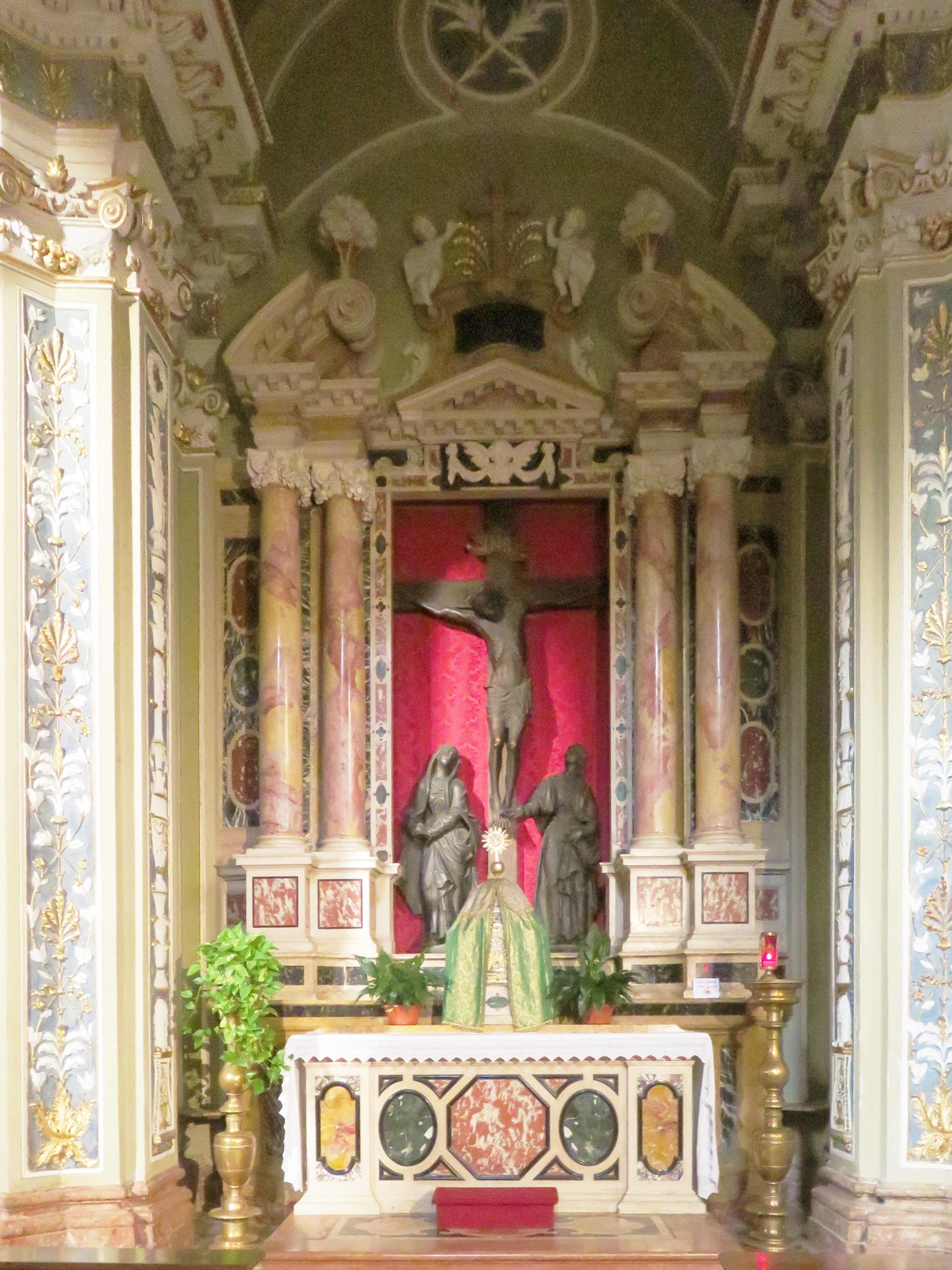 altare nella chiesa di San Marco